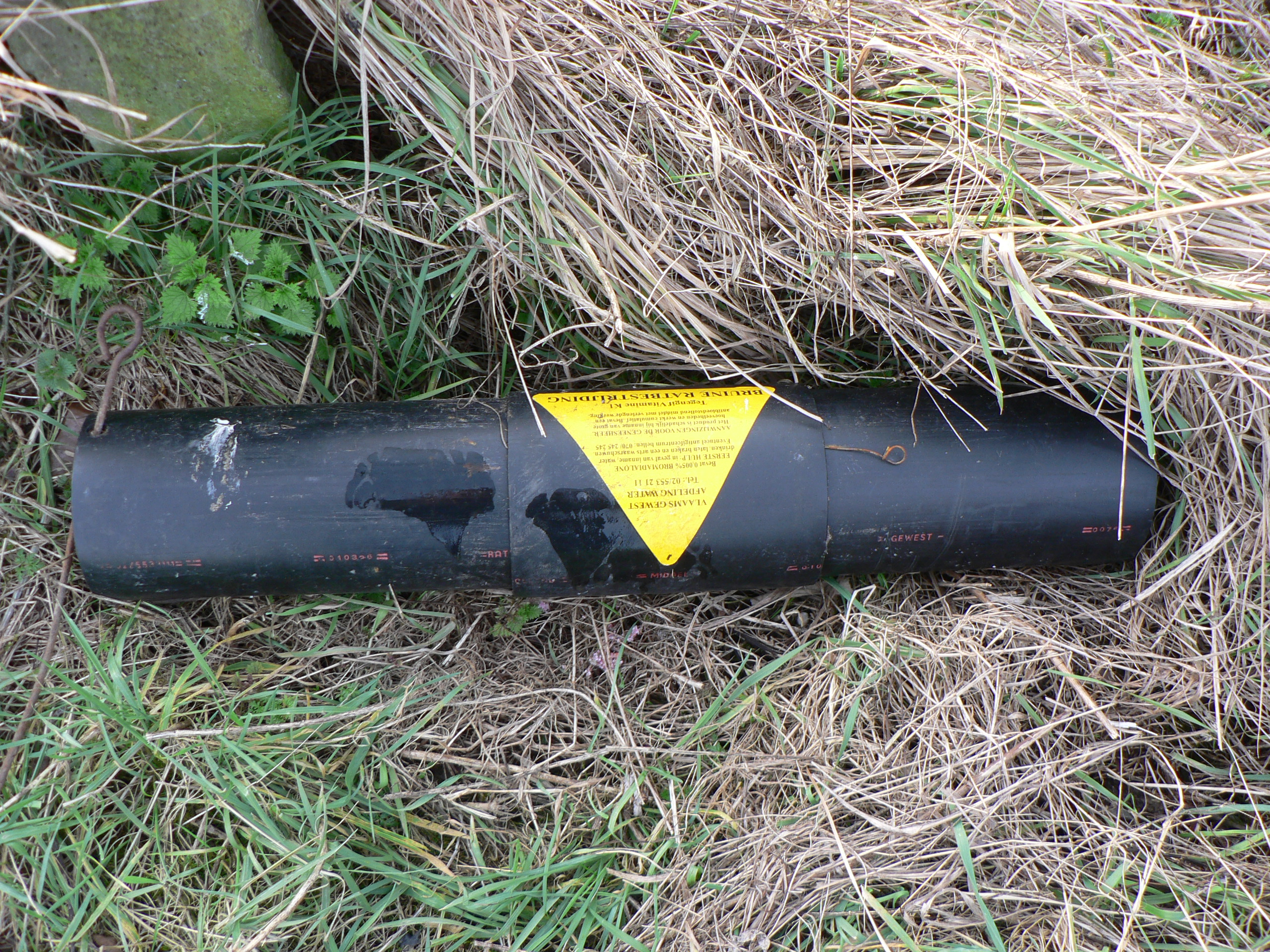 rat poison on the Schelde river dike, Steendorp, Belgium